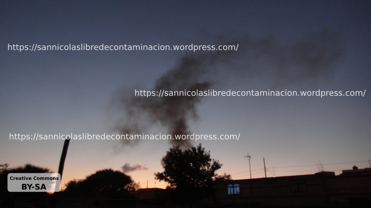 Horno en San Nicolás emanando humo, cerca del COBAQ a las 6:00am.